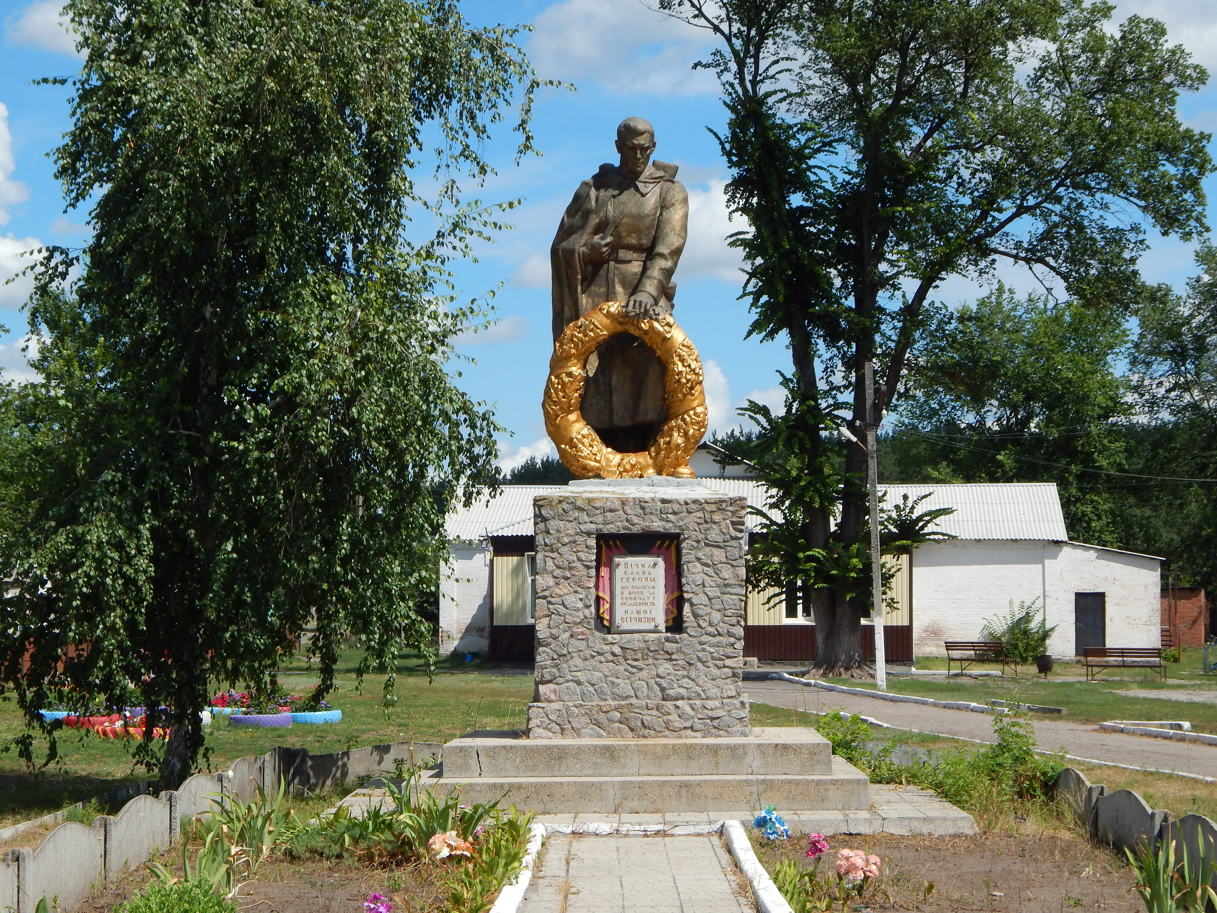 Братська могила радянсь-ких воїнів. Поховано 210 воїнів., Утківка